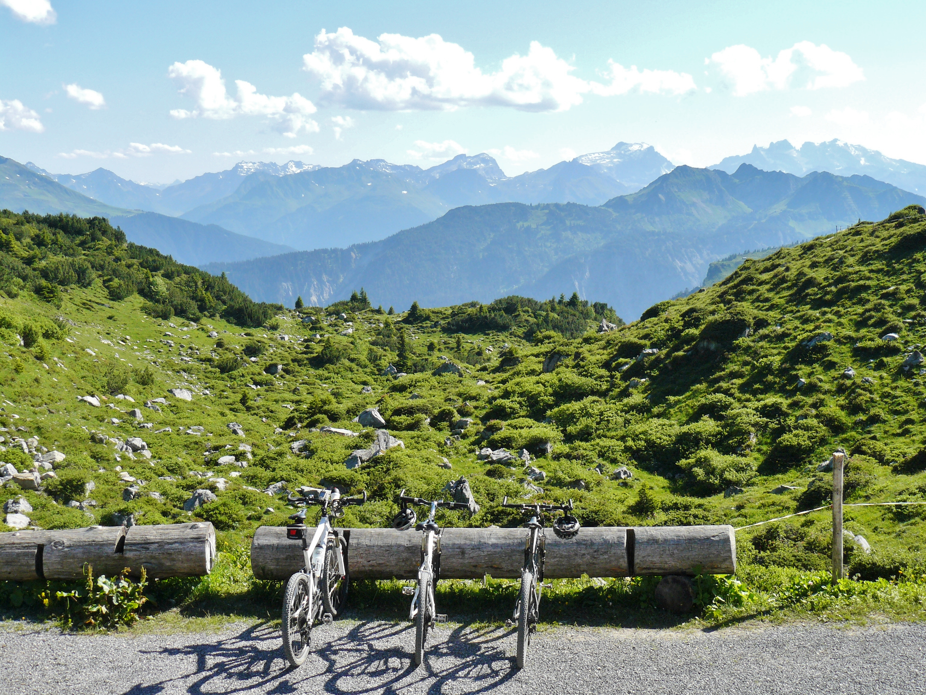 Blick Richtung Süden von der Freiburger Hütte